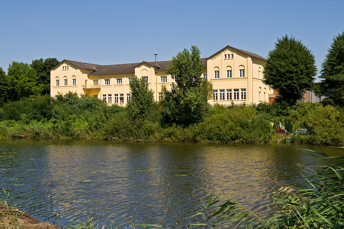 Die Grundschule in Hohnstorf (Elbe) befindet sich seit 1959 im ursprünglichen Empfangsgebäude des Bahnhofes Hohnstorf. Der Bahnhof wurde zwischen 1862 und 1864 als Zoll- und Endbahnhof der Zweigbahn Lüneburg–Hohnstorf an der Lauenburg-Hohnstorfer Elb-Traject-Anstalt gebaut. Das Bahnhofsgebäude war zur damaligen Zeit nach dem Bahnhof Hannover das zweitgrößte der Königlich Hannoverschen Staatseisenbahn. Das ehemalige Bahnhofsgebäude, der davor befindliche See, der beim Bau der Trajekt-Anstalt ausgehoben wurde, und ein noch vorhandenes Teilstück des Bahndamms stehen unter Denkmalschutz.